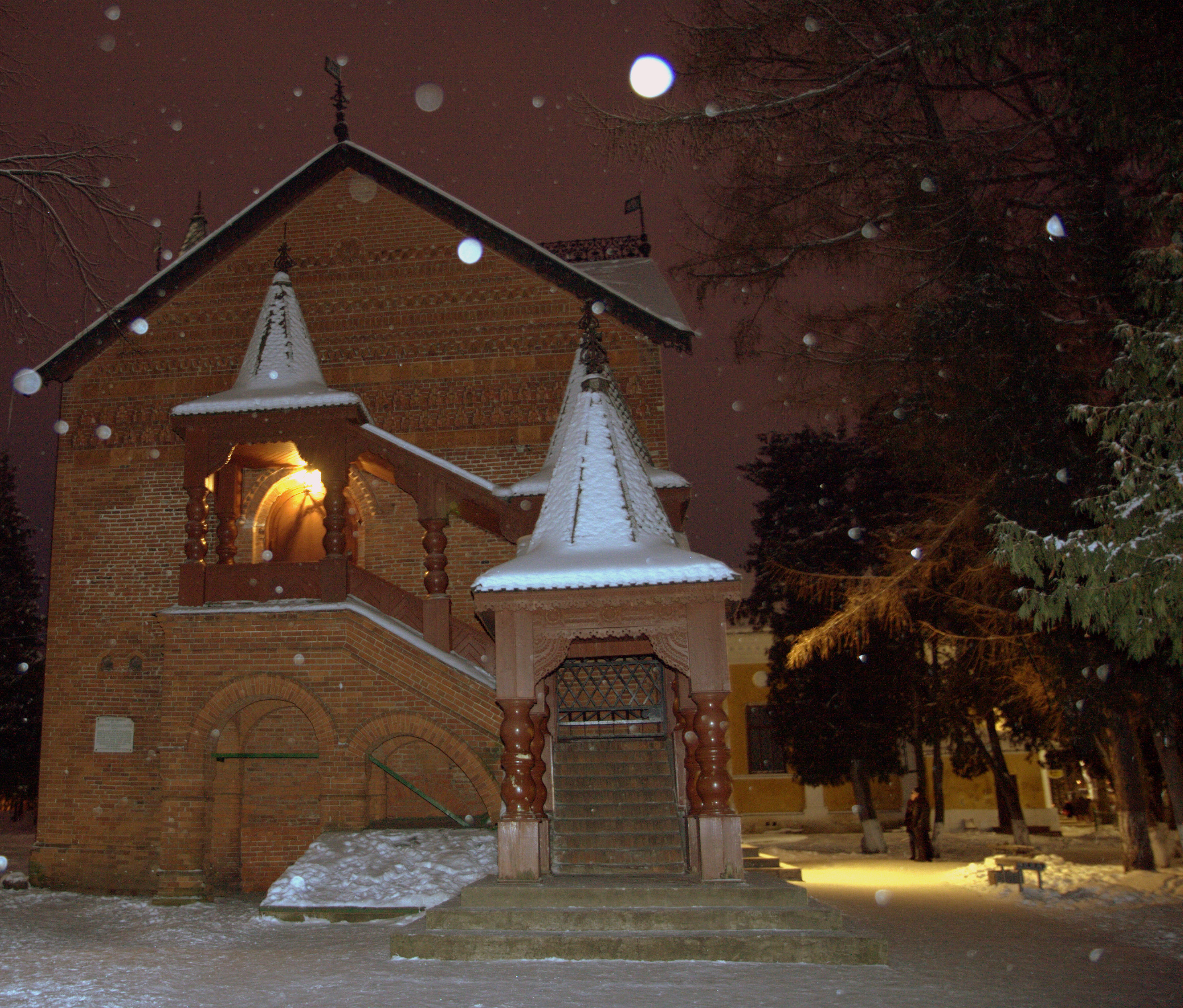 Палаты царевича Димитрия (Углич)